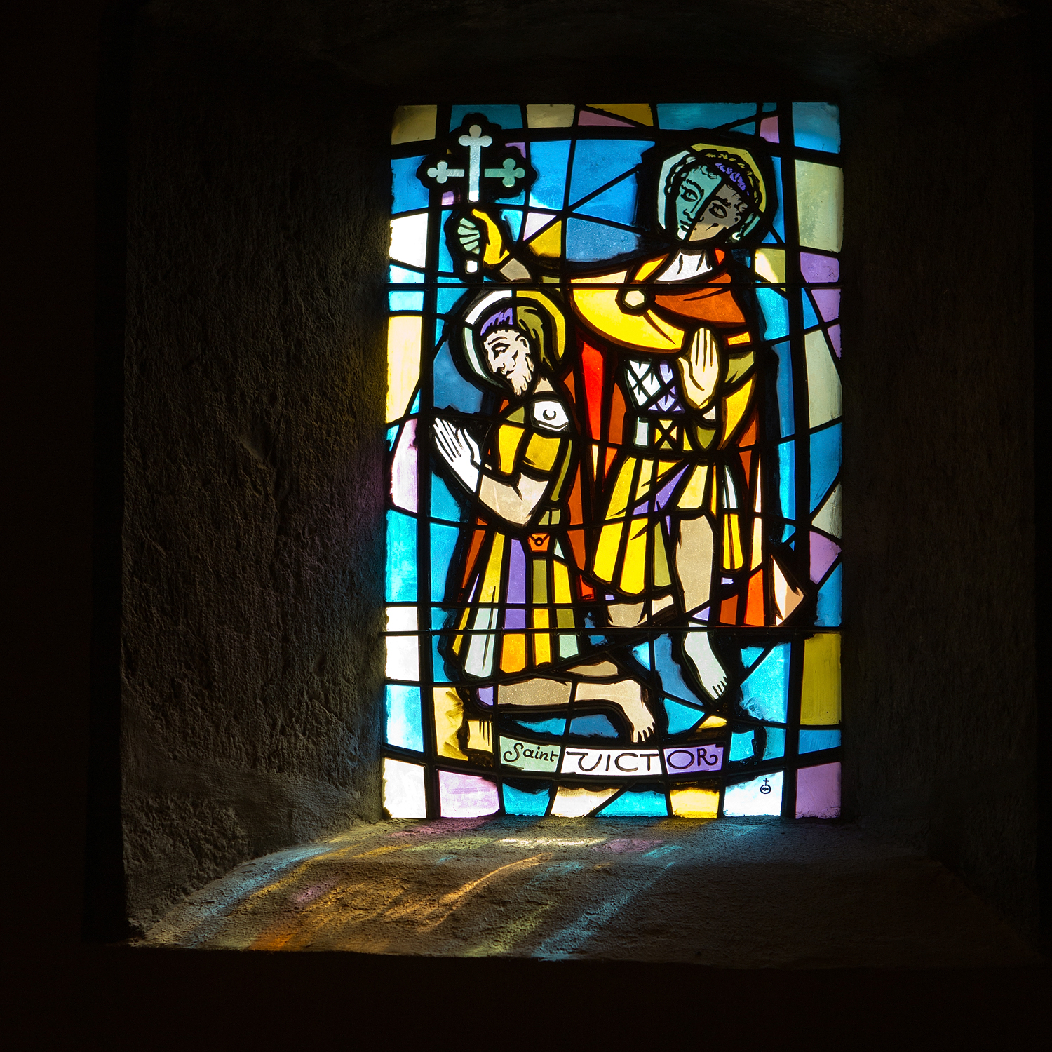 Kirchenfenster mit dem Kirchenpatron Saint Victor in der Kirche